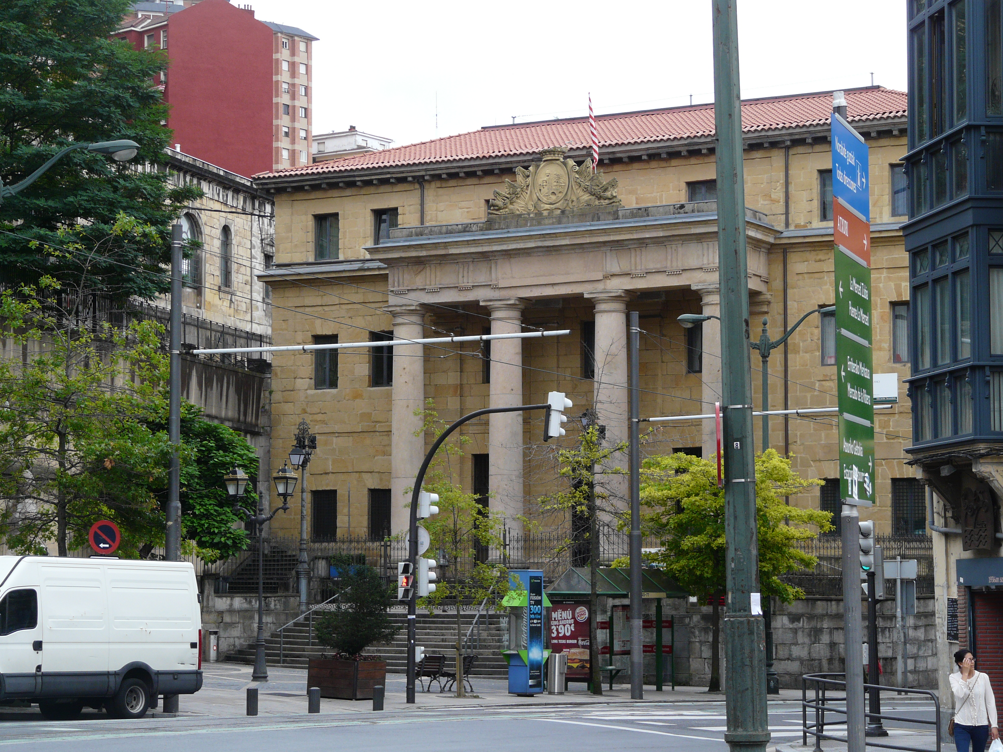 IES Emilio Campuzano